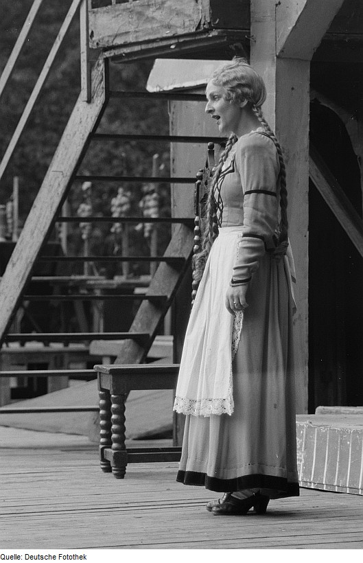 Original image description from the Deutsche Fotothek Szene mit der Figur Marie Stadinger beim Gastspiel des Landestheaters Altenburg mit der Oper "Der Waffenschmied" von Albert Lortzing, Parkbühne Markkleeberg, im Rahmen der "1. Gartenbau-Ausstellung der DDR"